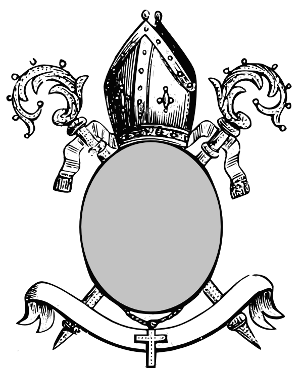 sjabloon wapen abt